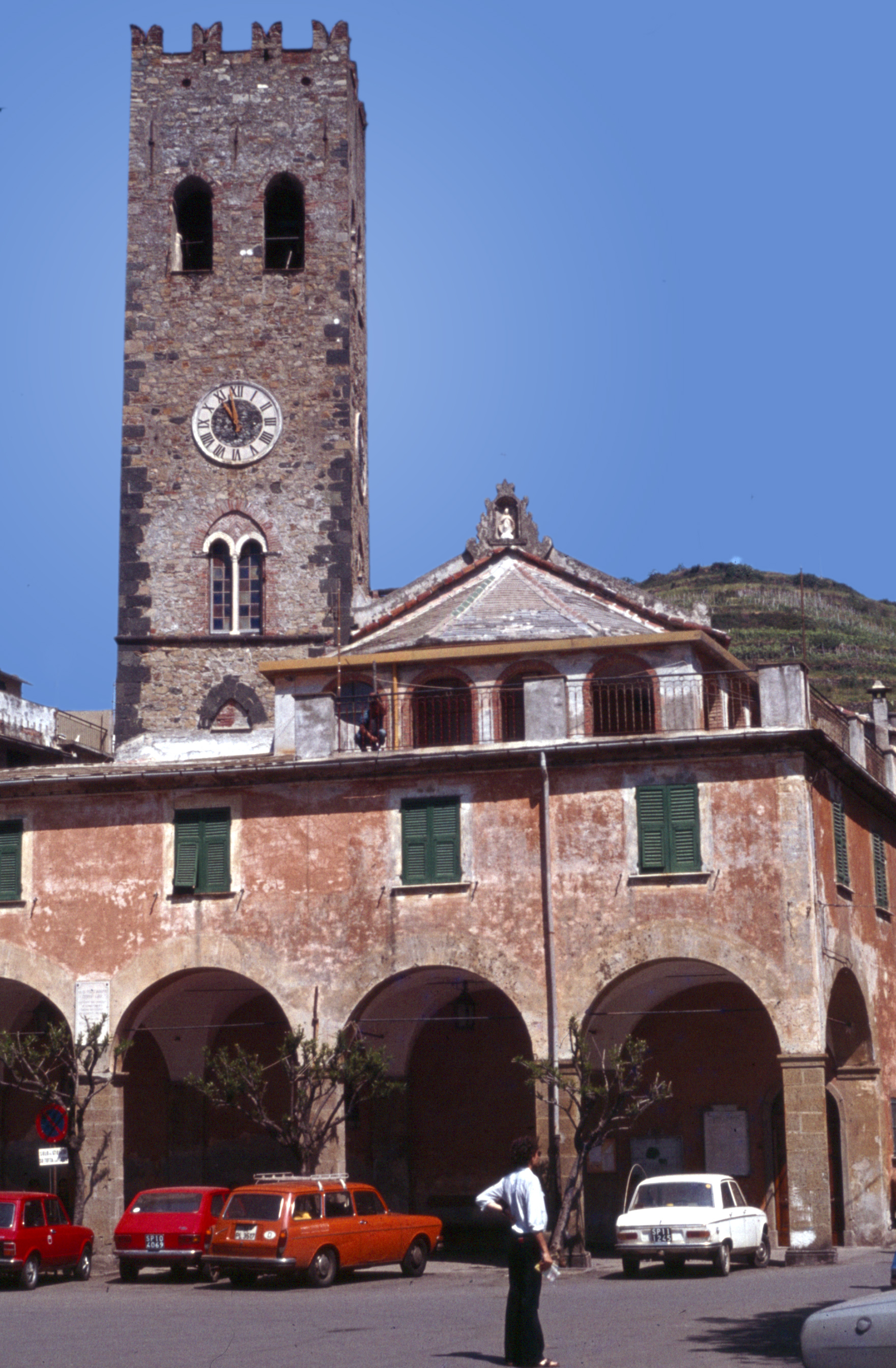 Monterosso al Mare